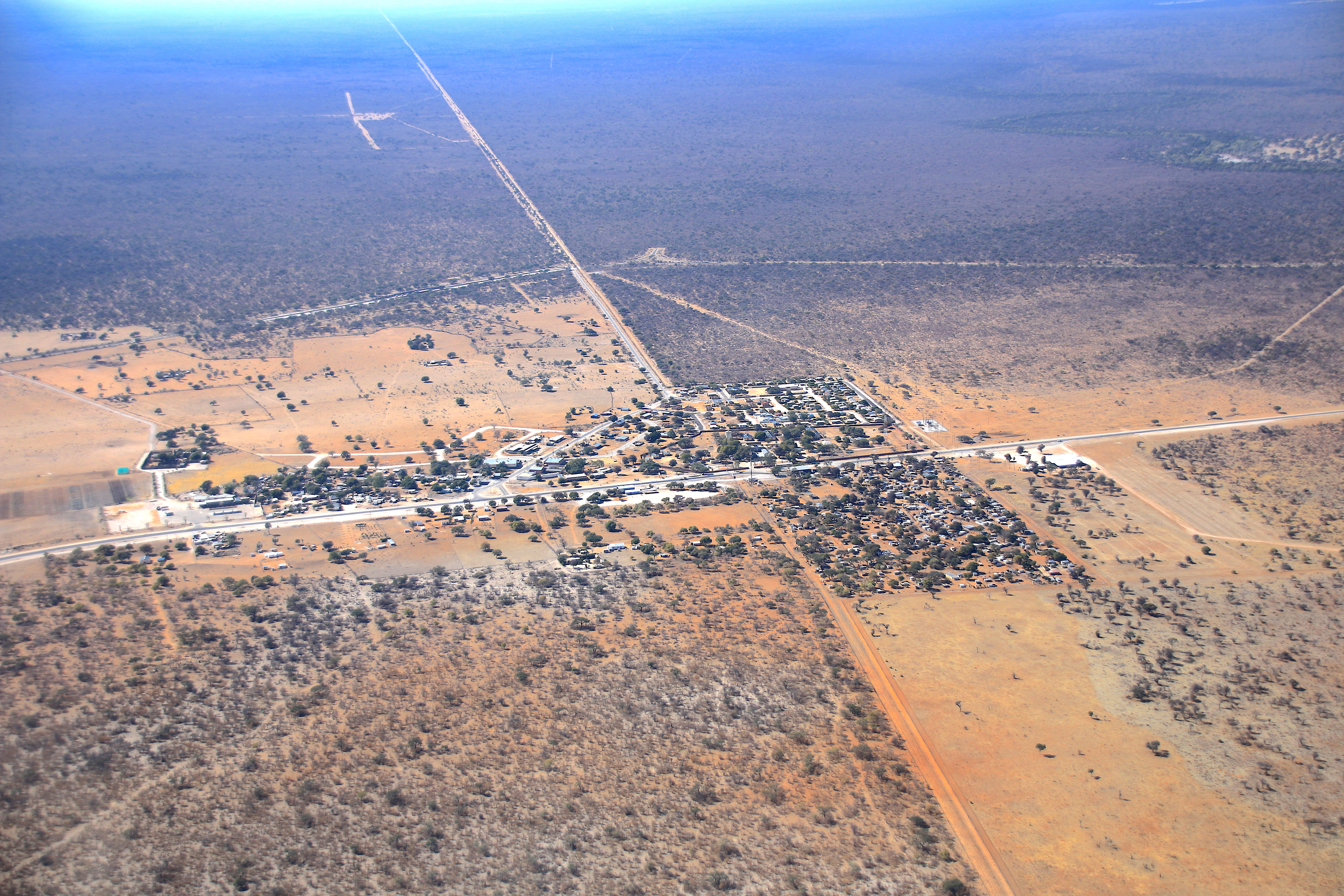 Oshivelo (2019)